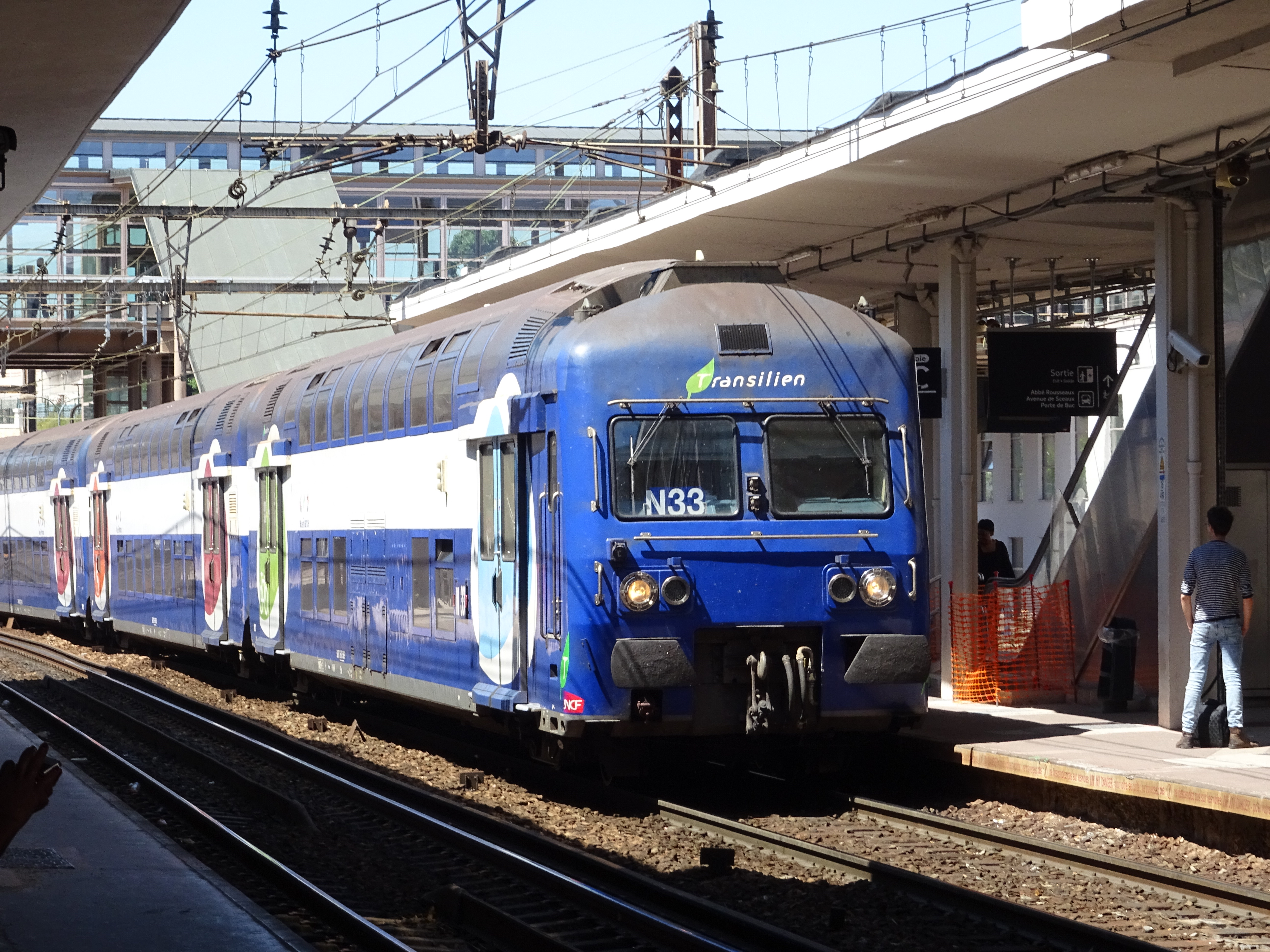 VB2N arrivant à Versailles-Chantiers